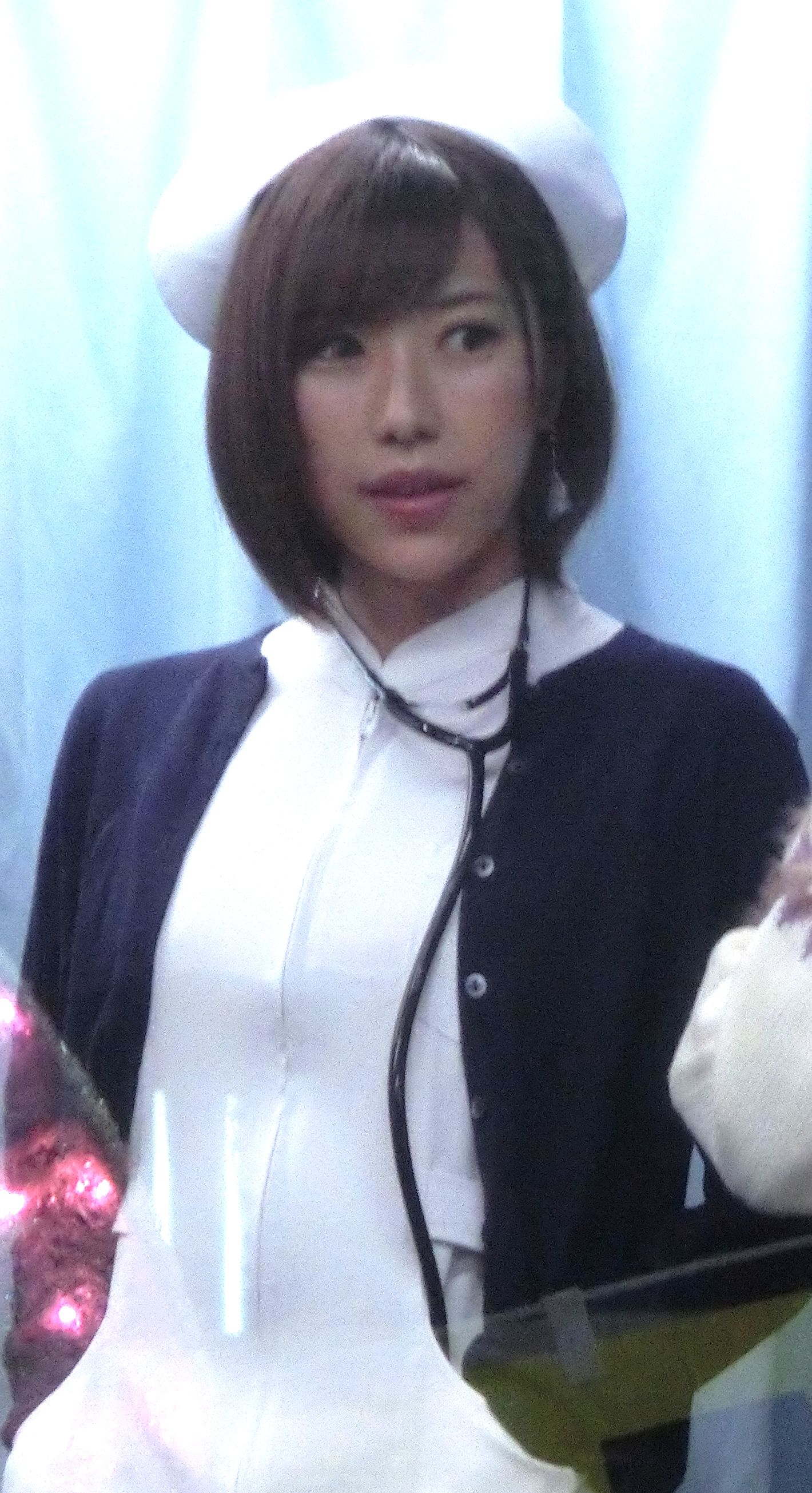 七海ティナ This file has been extracted from another file: DTテレビ2019年渋谷CIMG9684.jpg